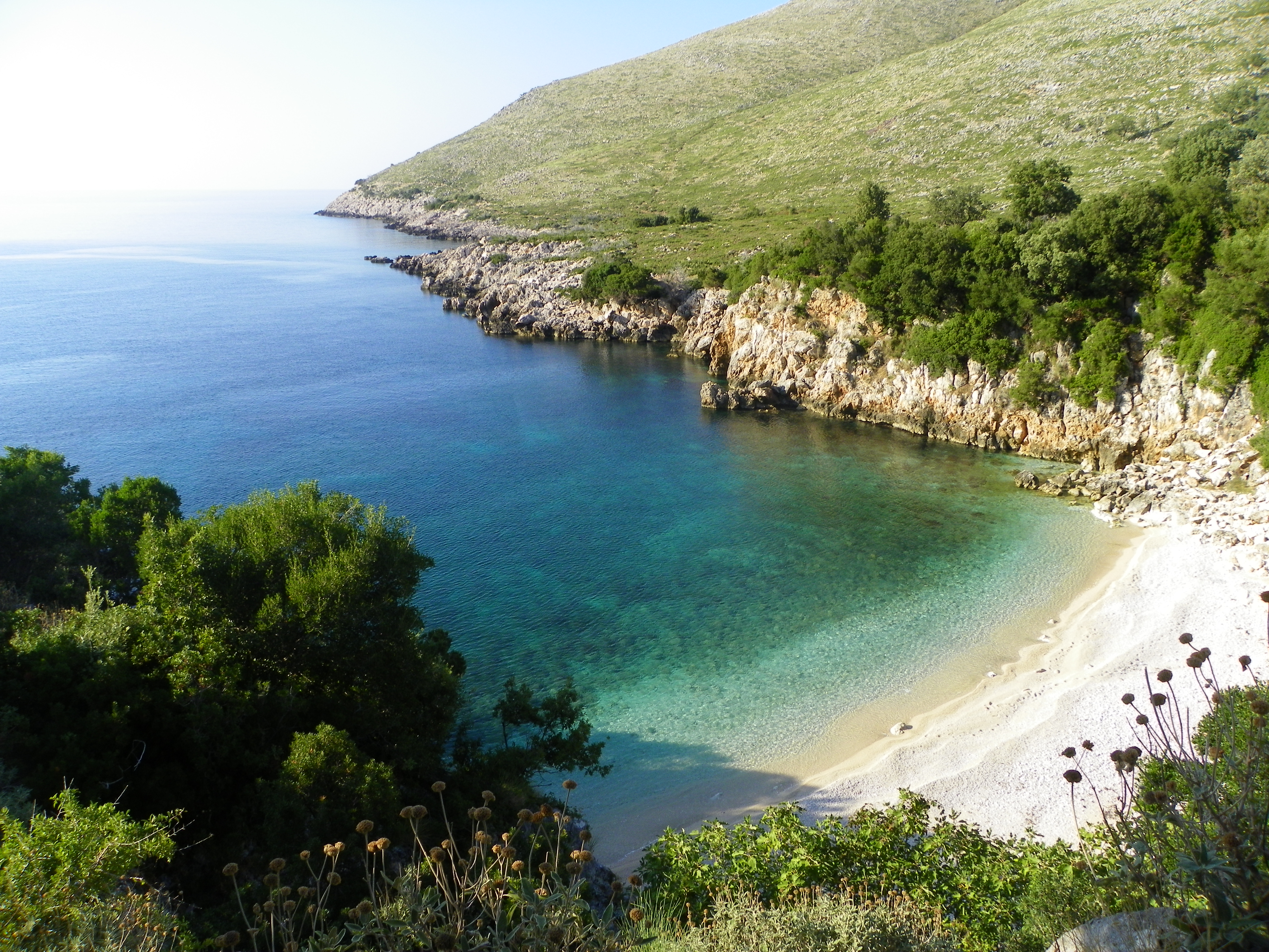 PKD Karaburun-Sazan, Vlore